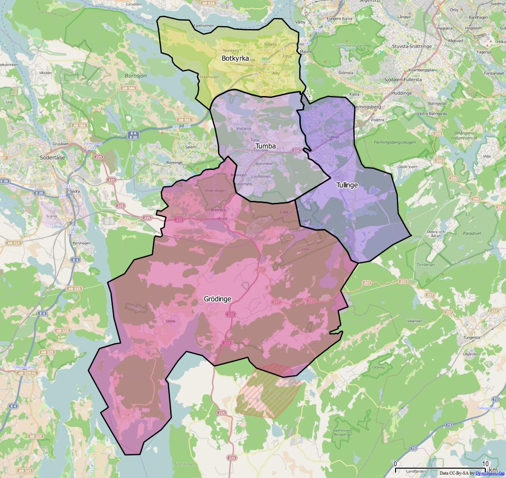 Distriktsindelningen i Botkyrka kommun